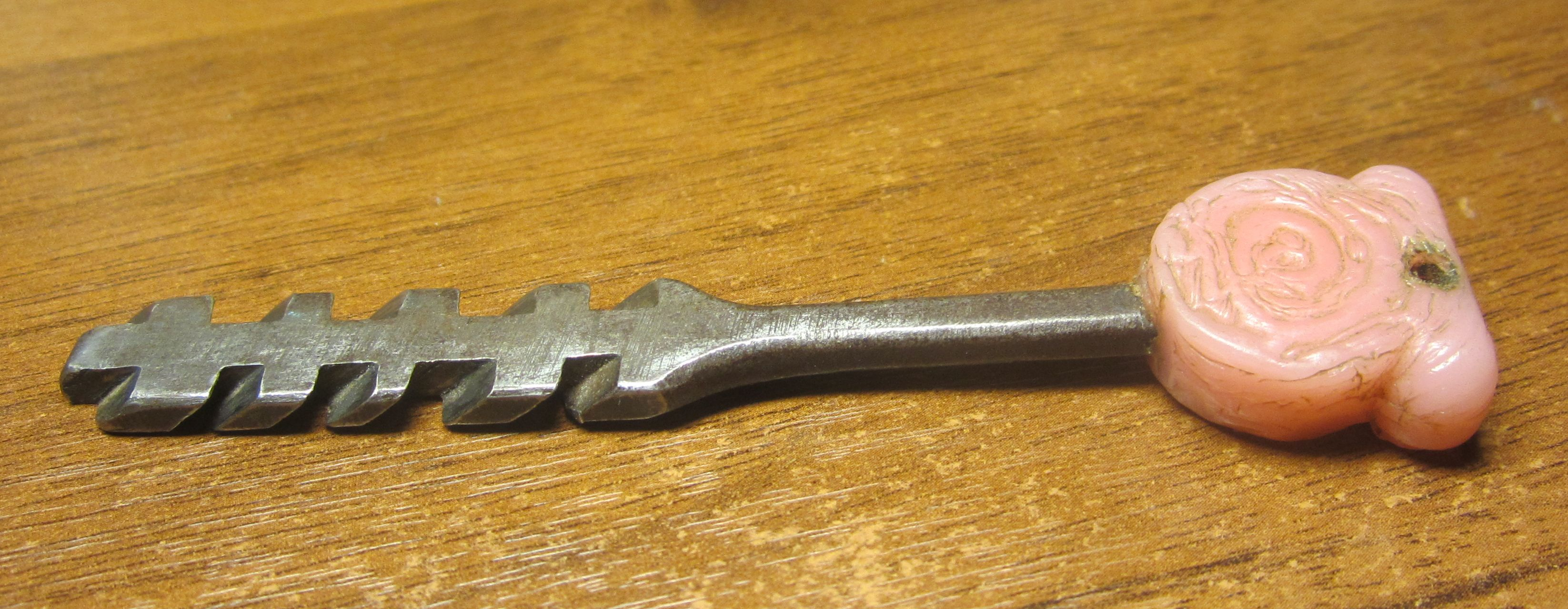 ключ от реечного замка